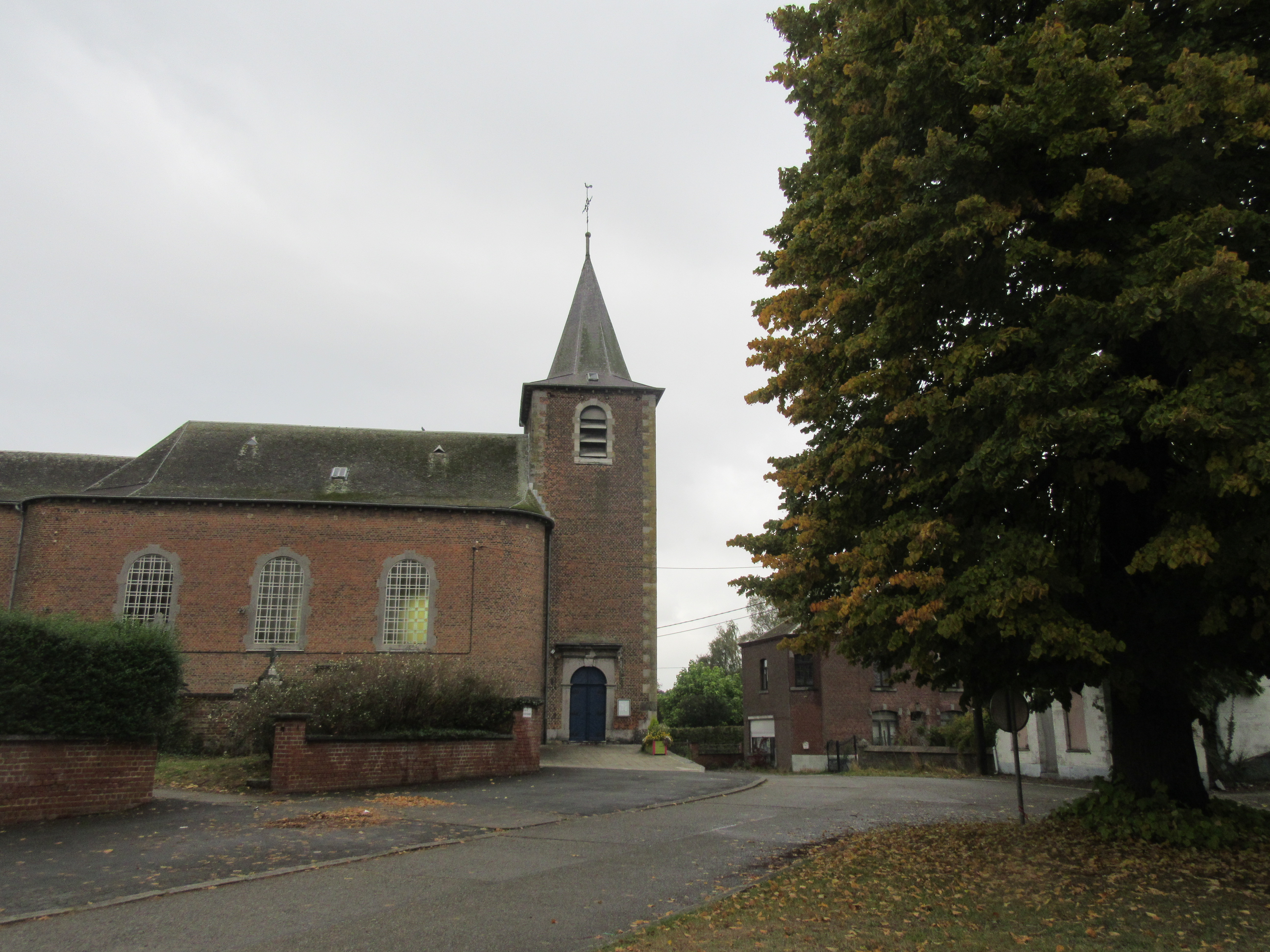 Vue du clocher, de la nef, du portail de l' église Saint-Lambert à Forville